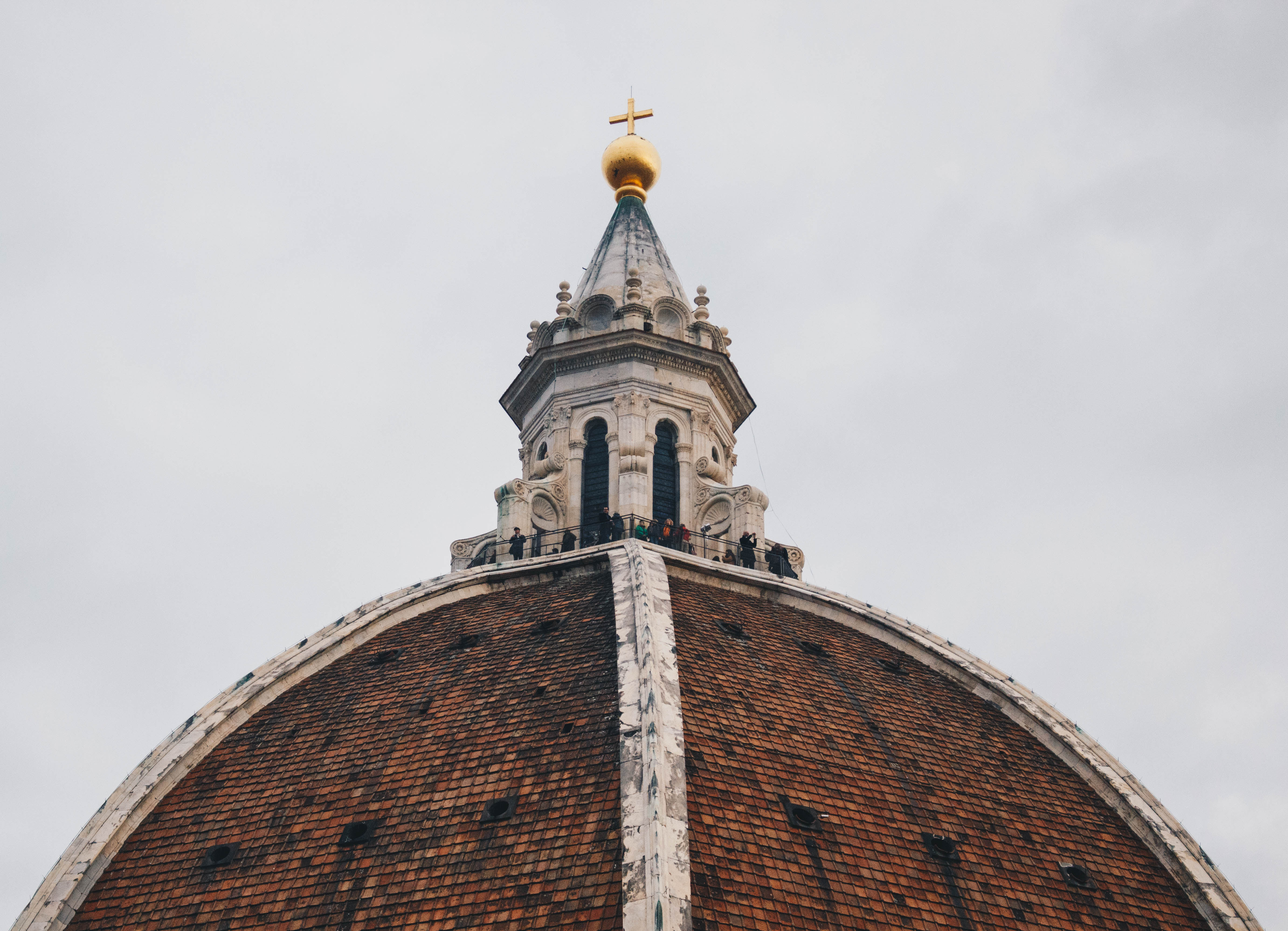 L'imponenza e la simmetria della cupola del Brunelleschi, vista dal campanile di Giotto.